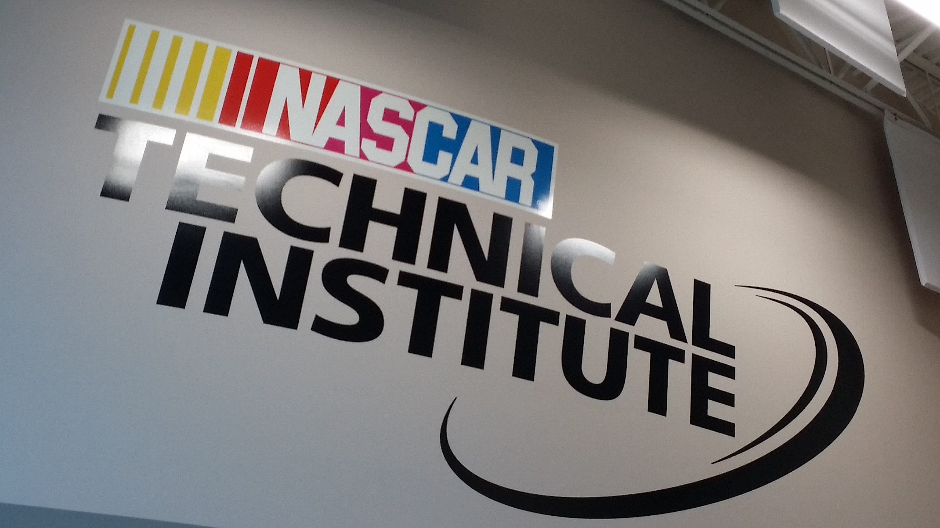 Aufnahme im Gebäude des NASCAR Technical Institute